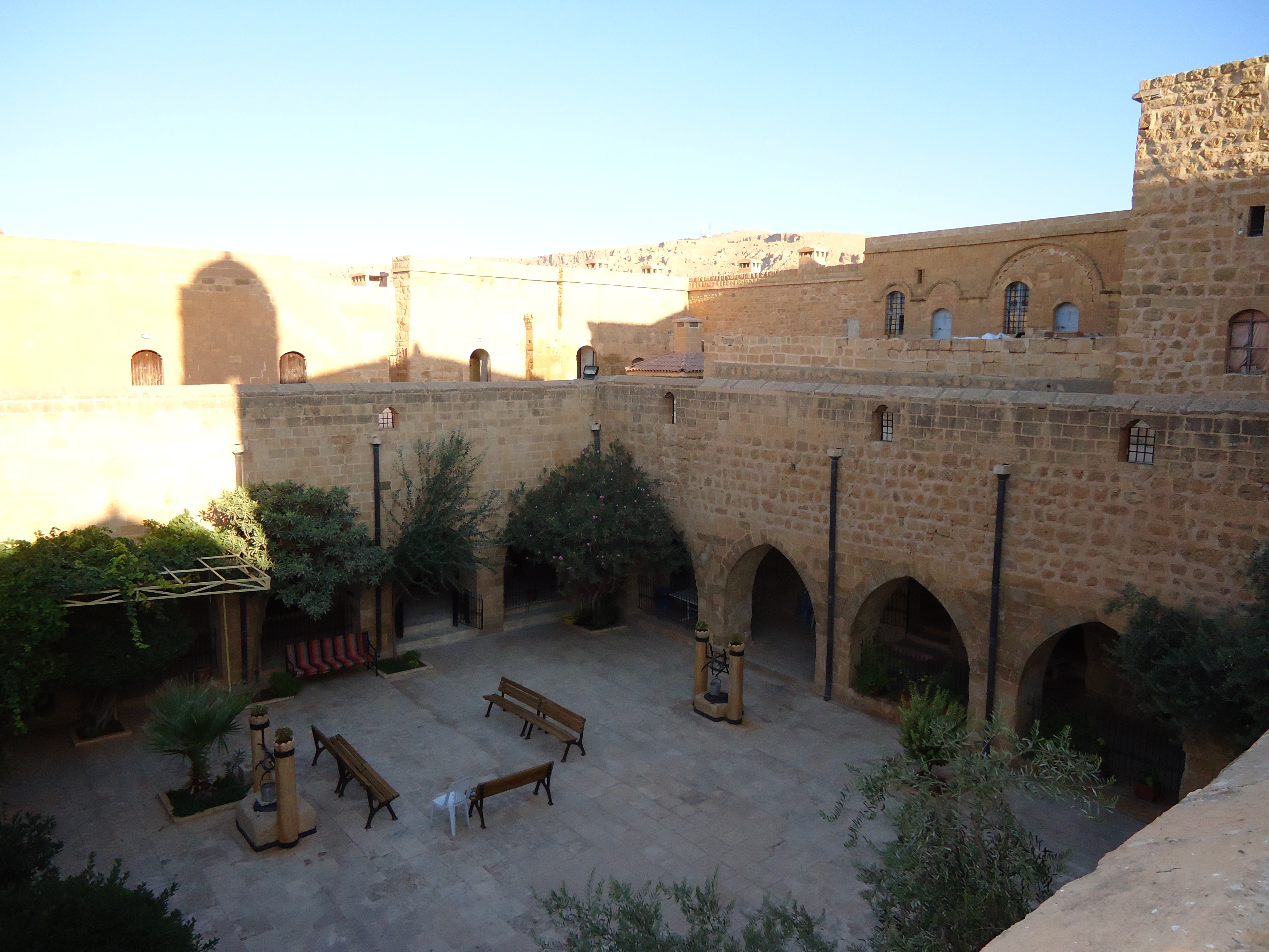 Kloster Zafaran, Innenhof